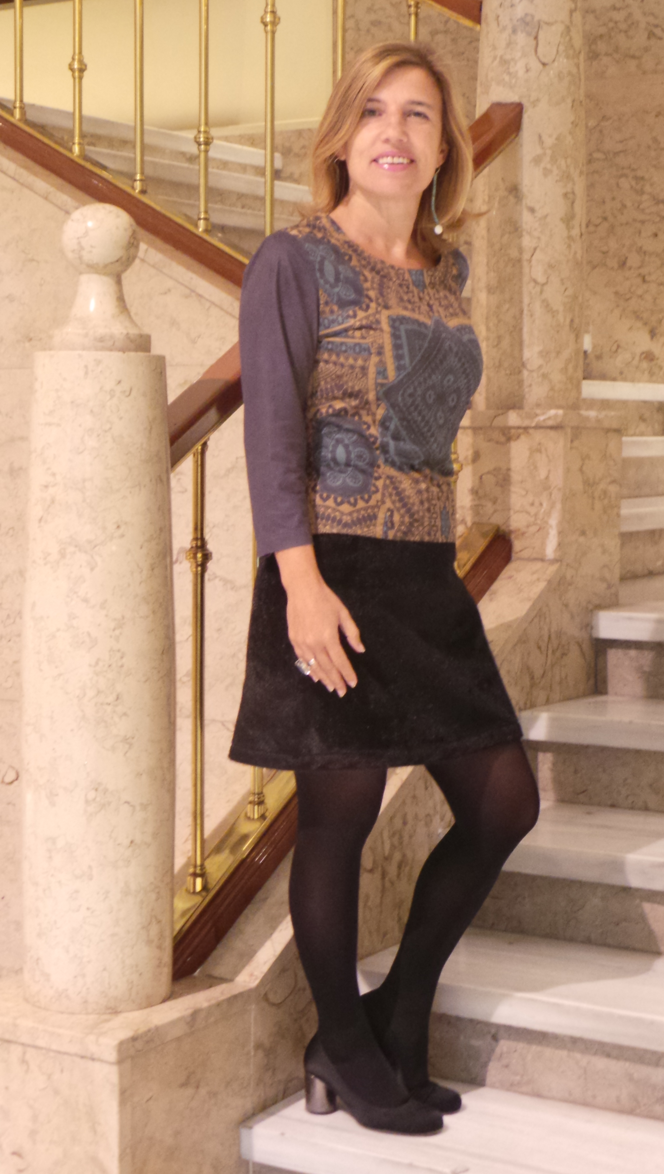 Fotografía de la diputada socialista Lourdes Muñoz Santamaría en el Congreso de los Diputados. Madrid 22 de abril de 2015